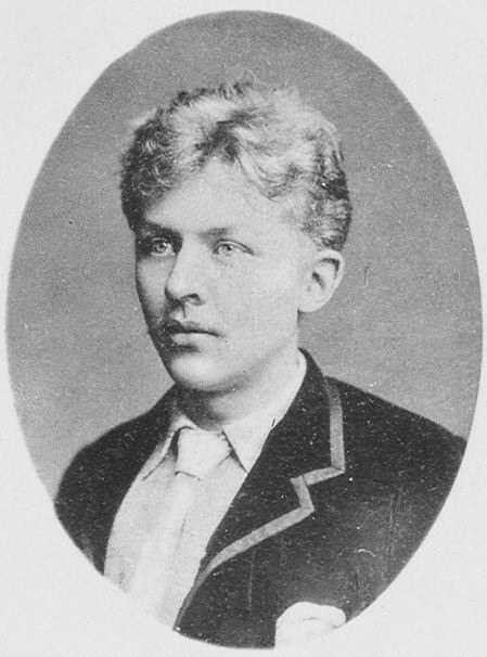 Jan Brandts BuysDeze foto is gepubliceerd in Henry Viotta's 'Onze Hedendaagsche Toonkunstenaars' uit 1893. Viotta is in 1933 overleden.